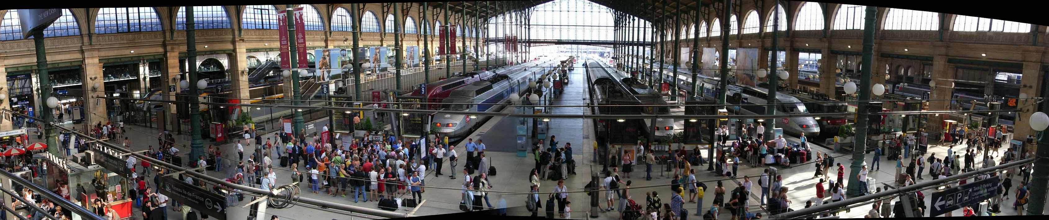 Gare du Nord, Paris Panoramamontage